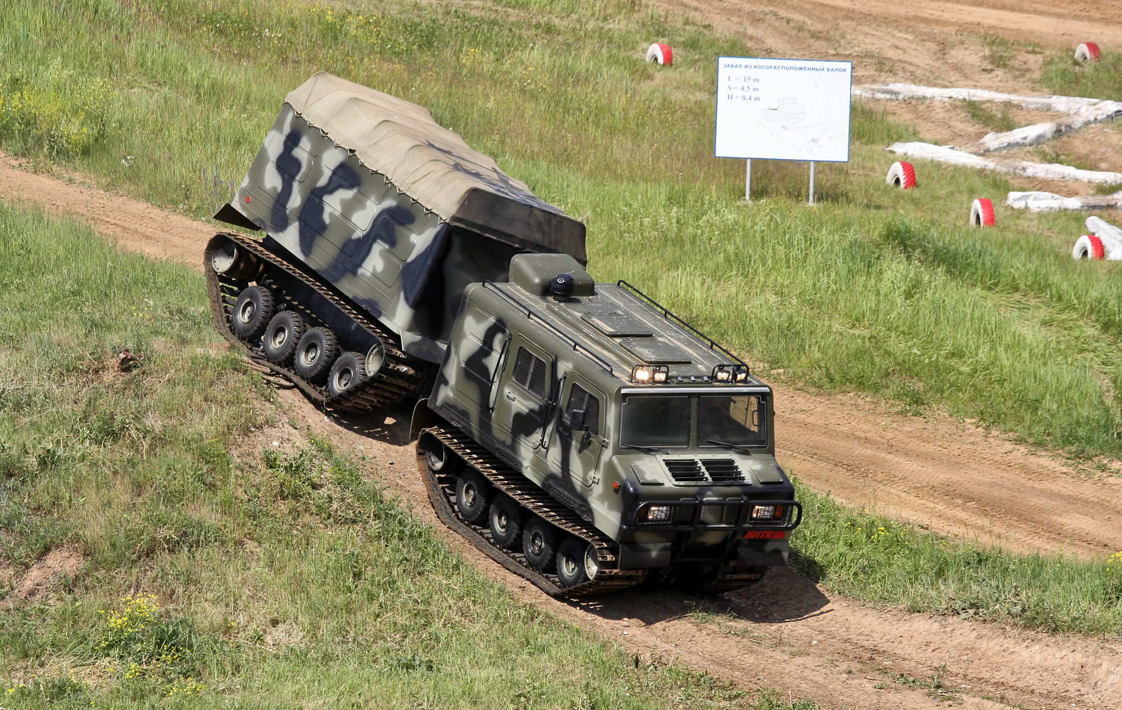 Двухзвенный гусеничный транспортер ДТ-3П (Two-section tracked carrier DT-3P)